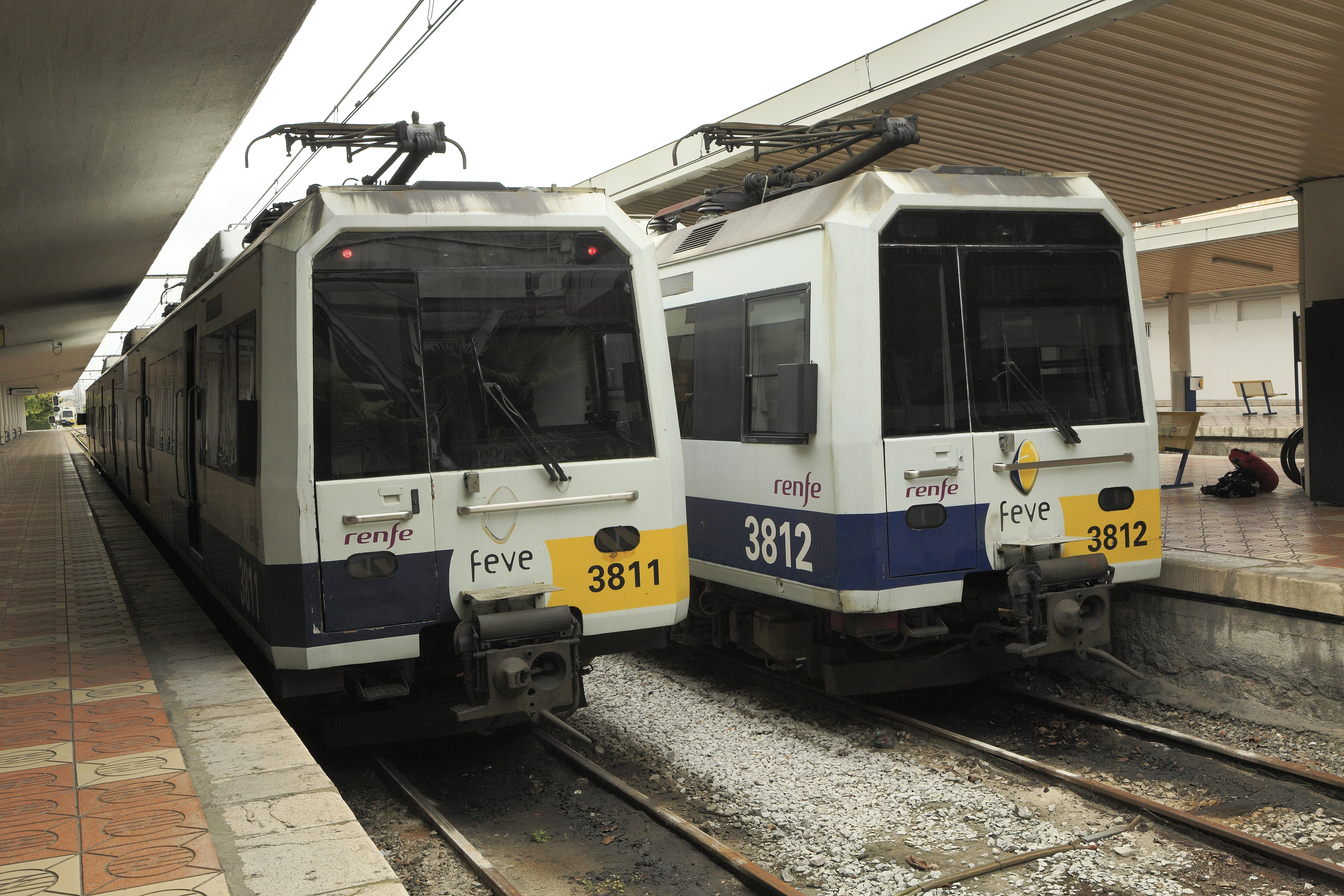 Elektrische Triebwageneinheiten aus Trieb-, Mittel- und Steuerwagen im S-Bahn-Einsatz um Santander.